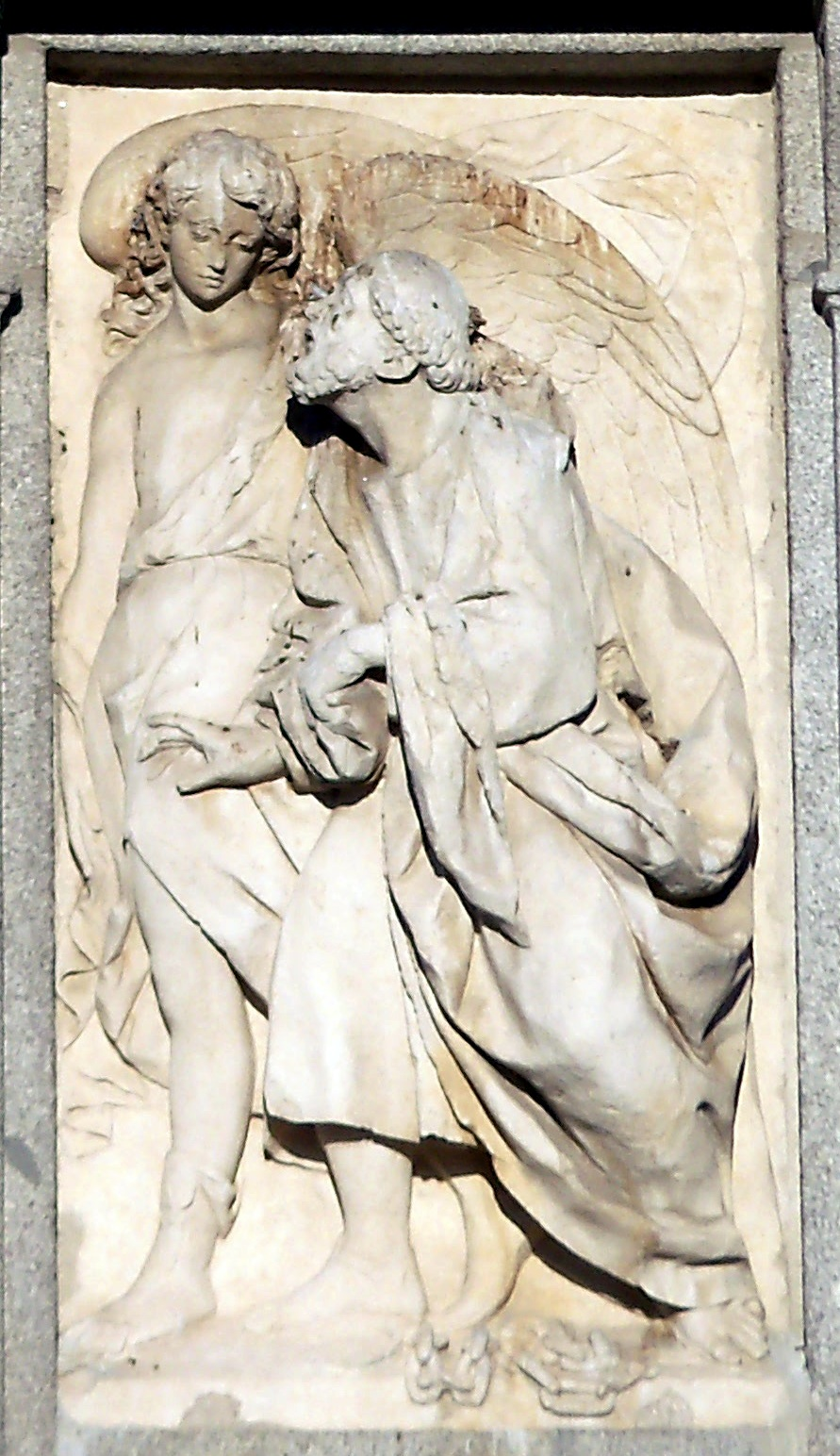 Iglesia de San Pedro ad Víncula (Vallecas, Madrid - España) - Horcina de la fachada principal : «La liberación de San Pedro».